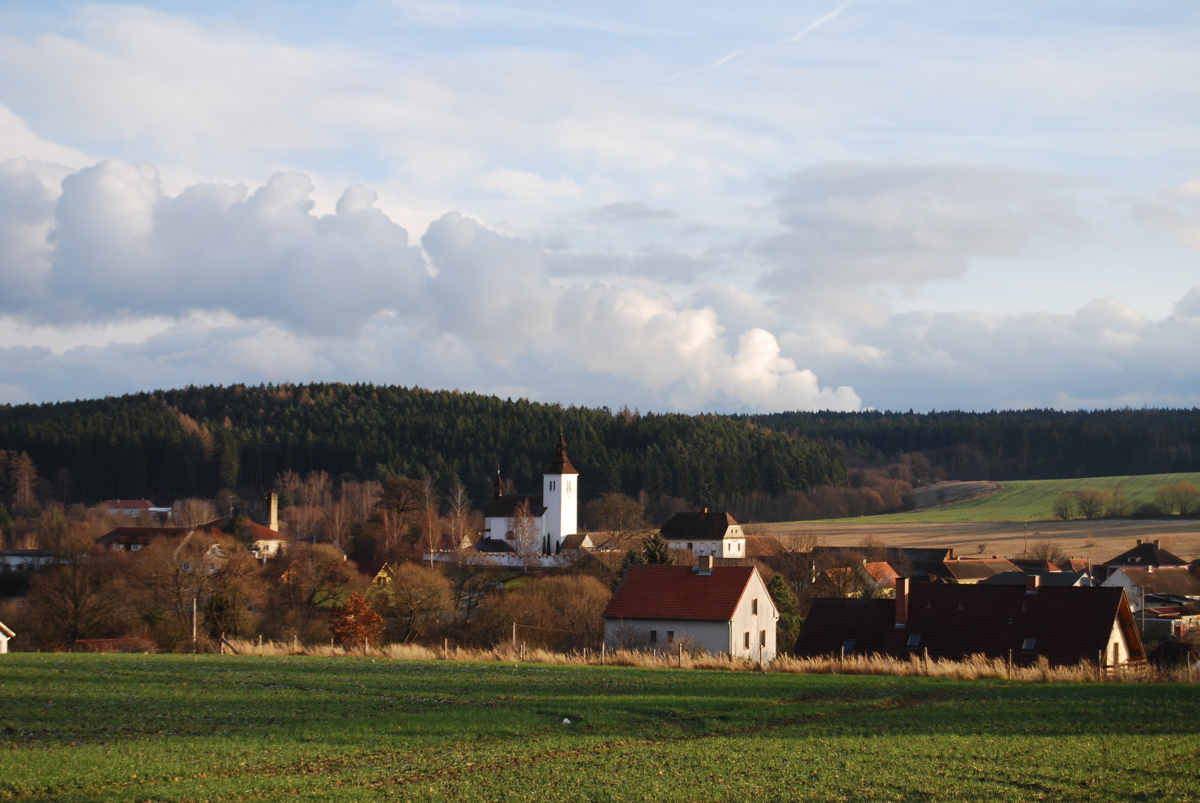 Albrechtice nad Vltavou. Okres Písek. Česká republika.